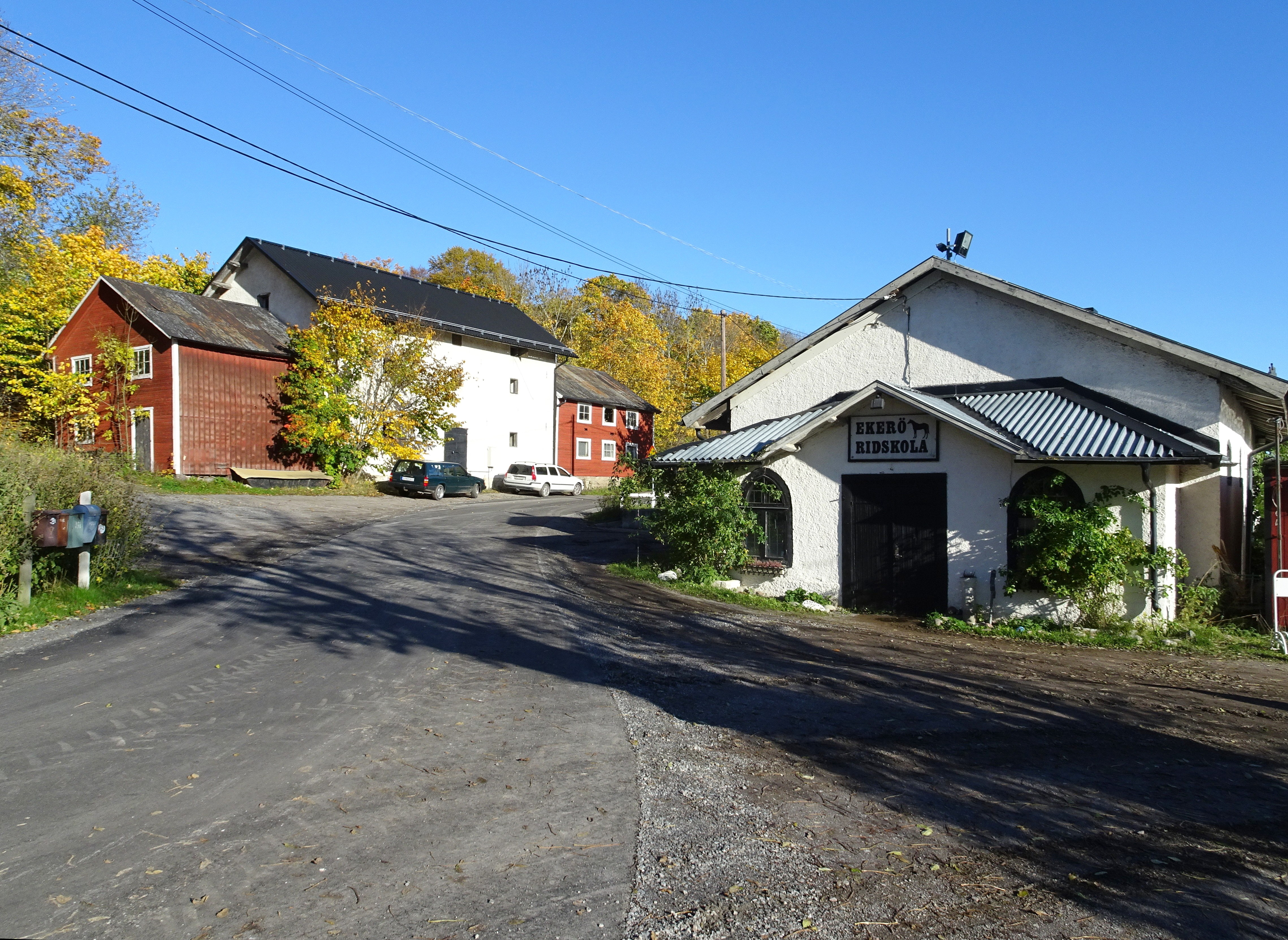 Ekebyhovs, ekonomibyggnader